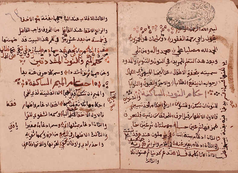 مخطوطة تحفة الأطفال في التجويد - سليمان الجمزوري - نسخة أولى - المكتبة الأزهرية: خاص ٣٨٥ - عام ٢٩٨١٠